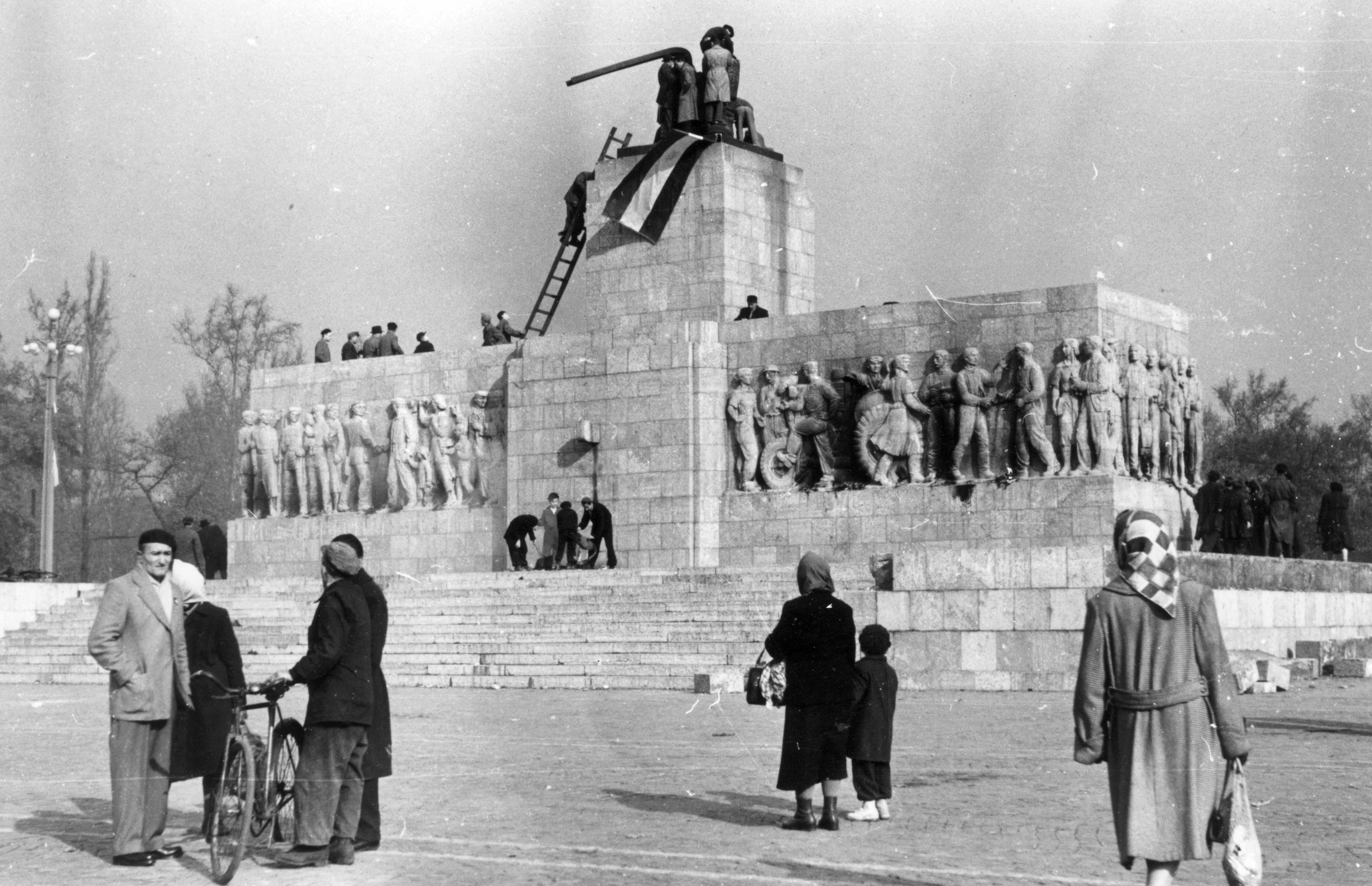 Budapest Sztálin tér, a Sztálin szobor maradványa.